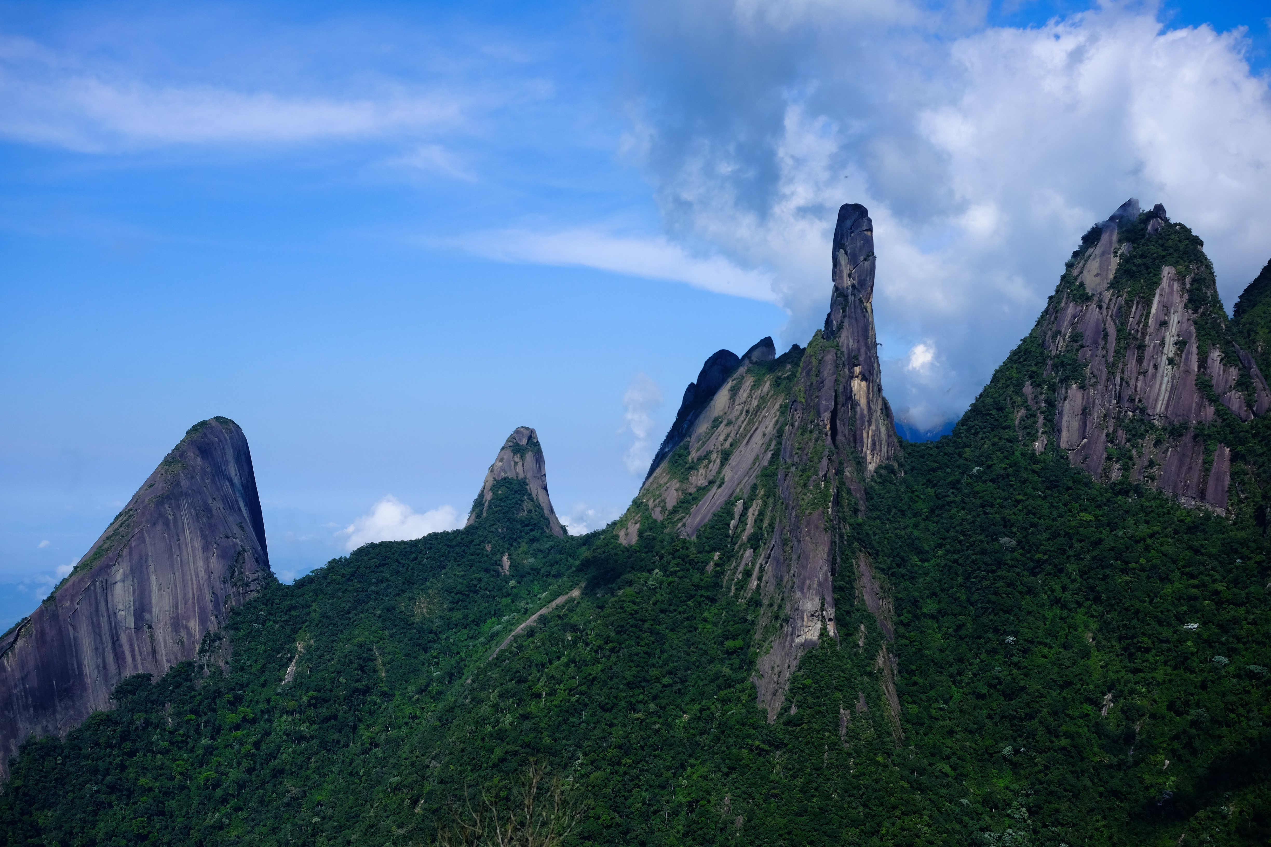 Dedo De Deus - Vista Teresopolis